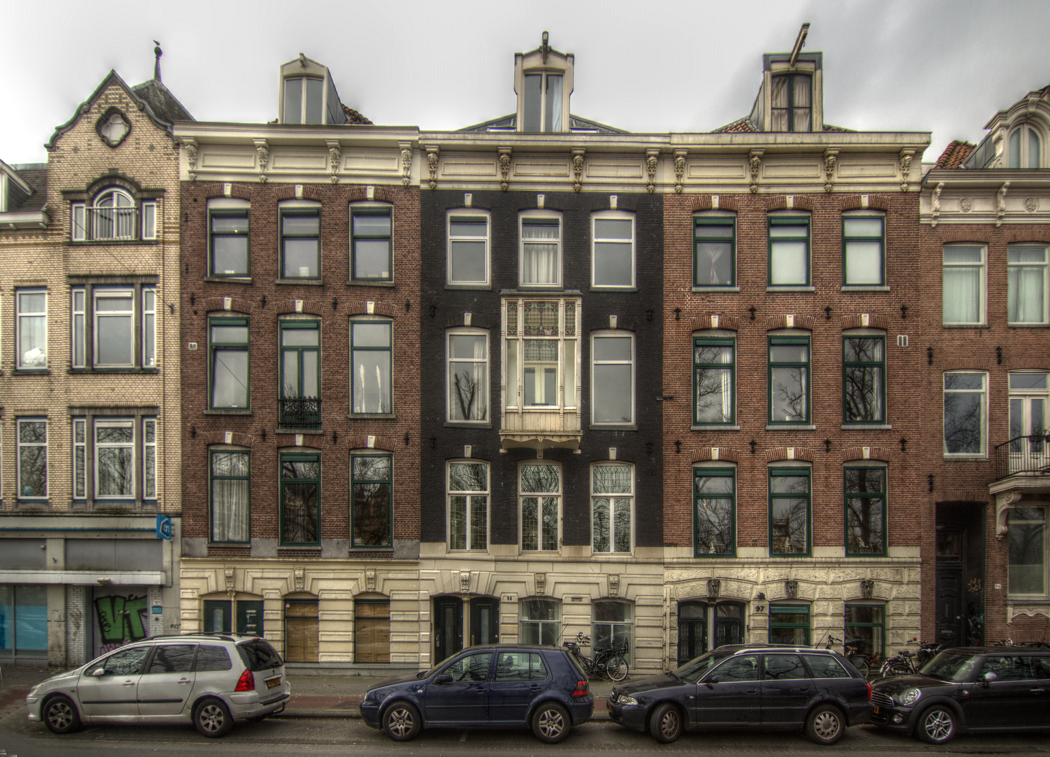 Van links naar rechts de panden op nr 99, 98 en nr 97 op de Stadhouderskade te Amsterdam. december 2015